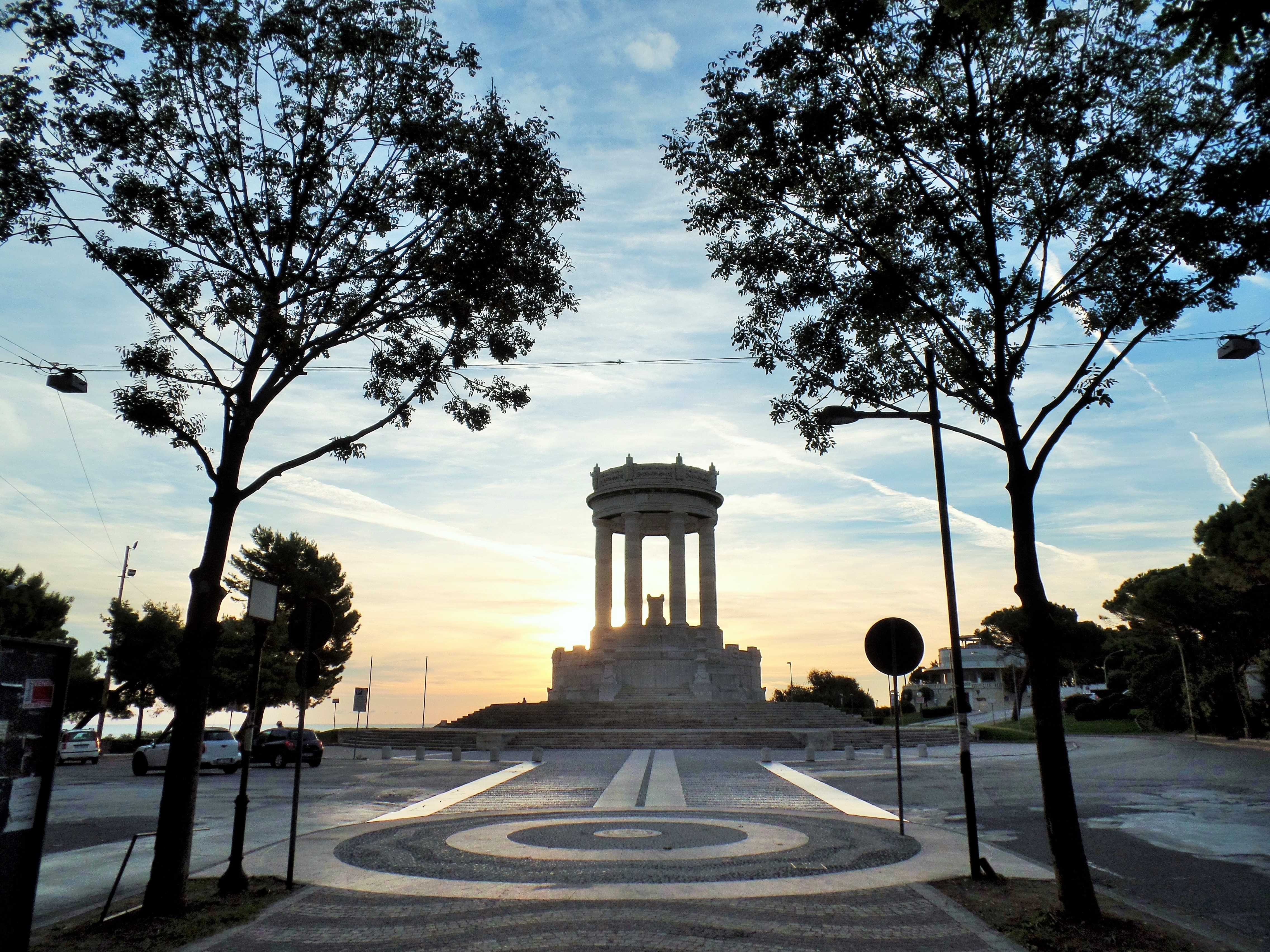 Monumento ai Caduti Ancona all'alba This is a photo of a monument which is part of cultural heritage of Italy.